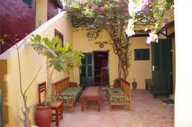 Interieur du musée Henriette Bathily